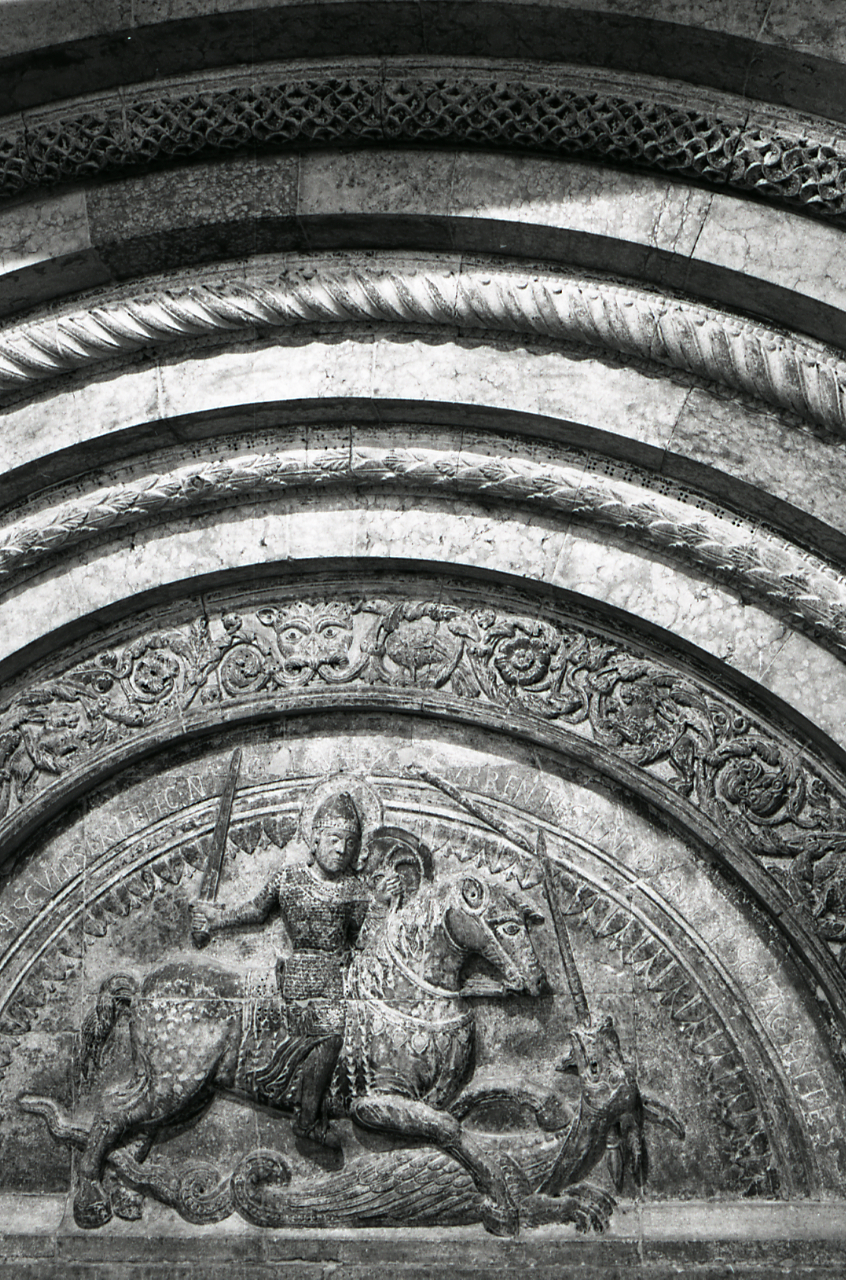 Servizio fotografico : Ferrara, 1982 / Paolo Monti. - Strisce: 7, Fotogrammi complessivi: 38 : Negativo b/n, gelatina bromuro d'argento/ pellicola ; 35 mm. - ((Sul portanegativi: N[I]K[MA]T-EL PanF. - Occasione: Lavori di restauro delle sculture e decorazioni scultoree. - Fonte: Agenda di Paolo Monti: Nikon Leika 3001-/ Monti 1978 (1978-1982), presso Archivio Paolo Monti